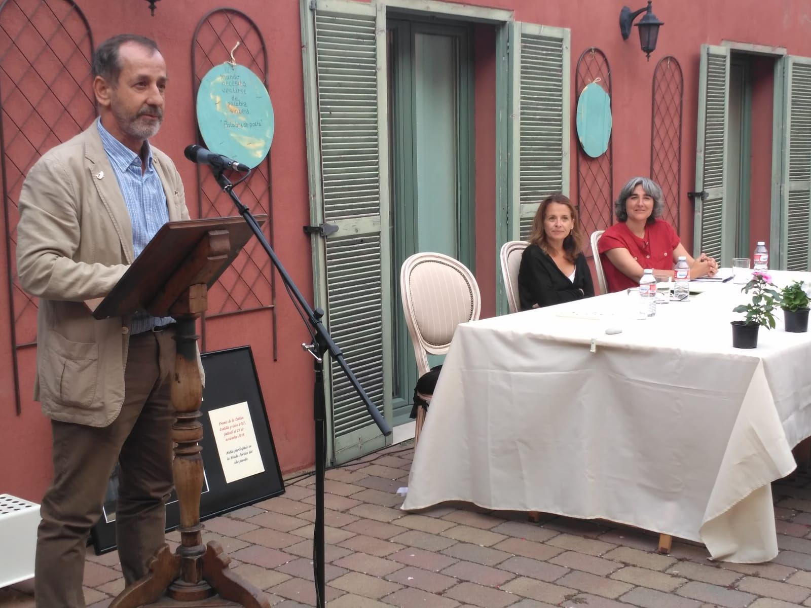 El escritor y poeta Emilio Gavilanes interviene en la IX Velada "Poesía en el Camino" celebrada en Olmillos de Sasamón (Burgos) el 10 de agosto de 2019.